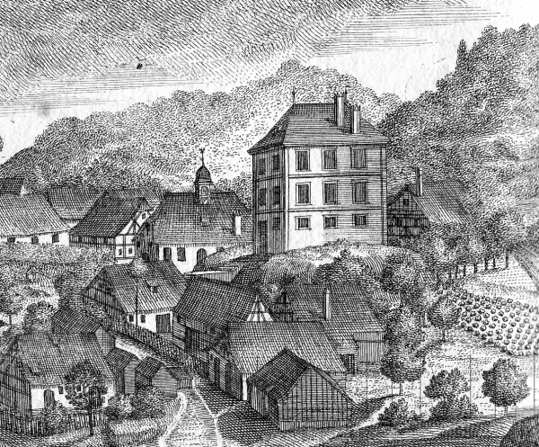 „Grünreuther Schlößl“ (1920 abgebrochen), Ausschnitt aus einem Kupferstich von J. A. Delsenbach um 1722